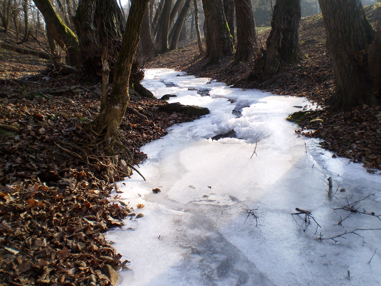 A Váraljai-patak télen (Tolna megye)